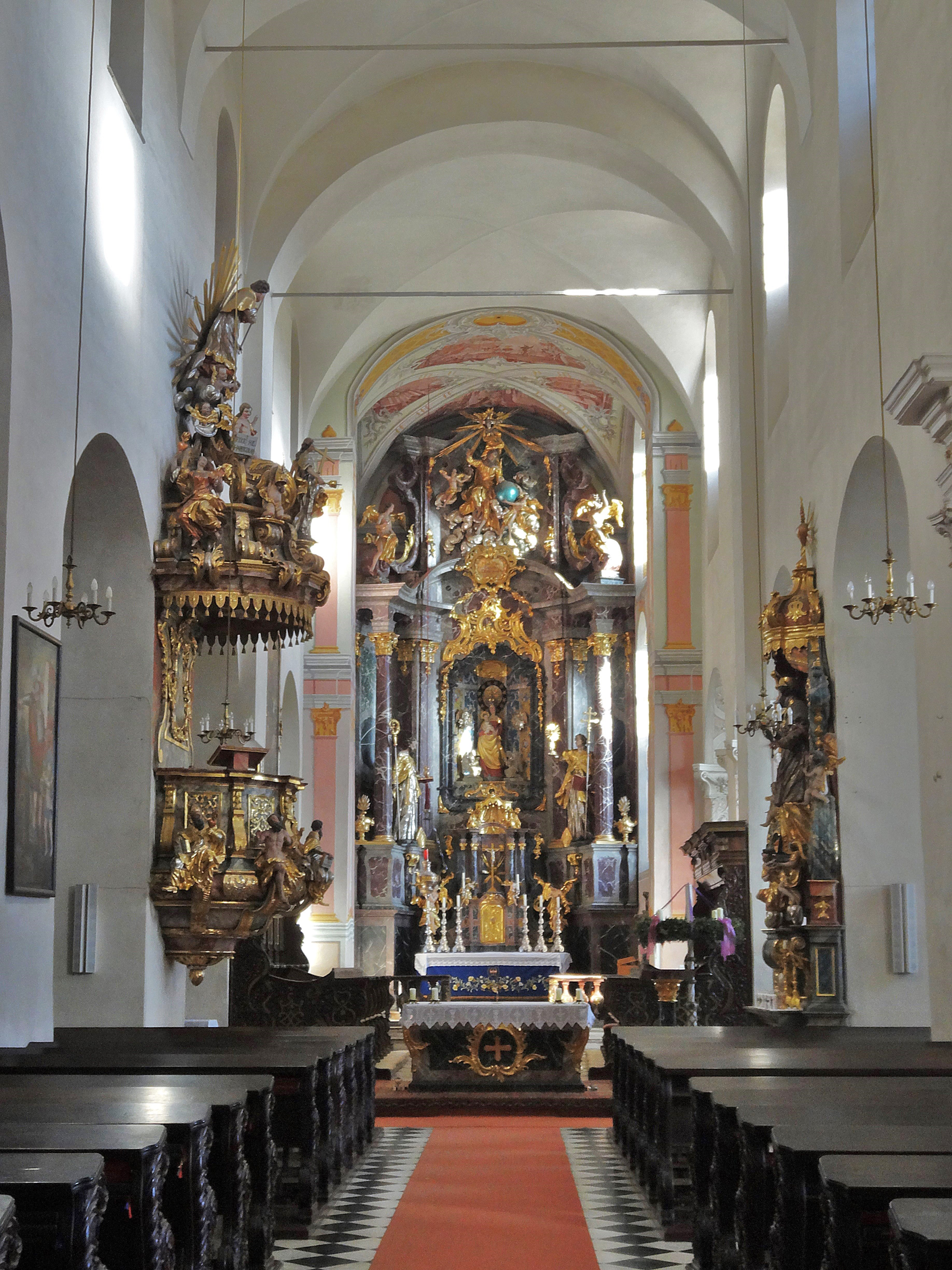 Stift Griffen, Pfarrkirche Maria Himmelfahrt, Innenansicht mit Hochaltar